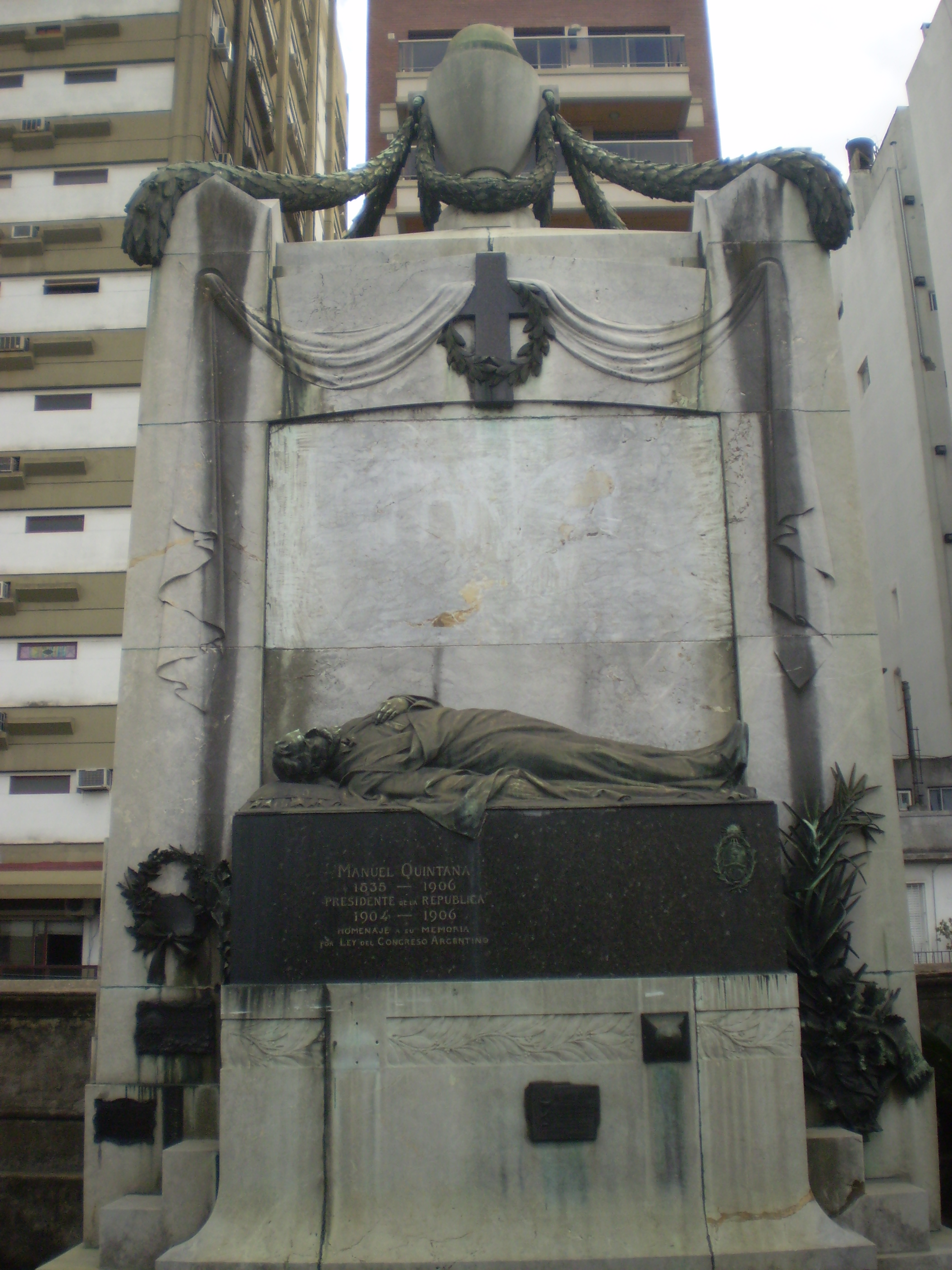 Monumento fúnebre de Manuel Quintana, Cementerio de la Recoleta, Buenos Aires.